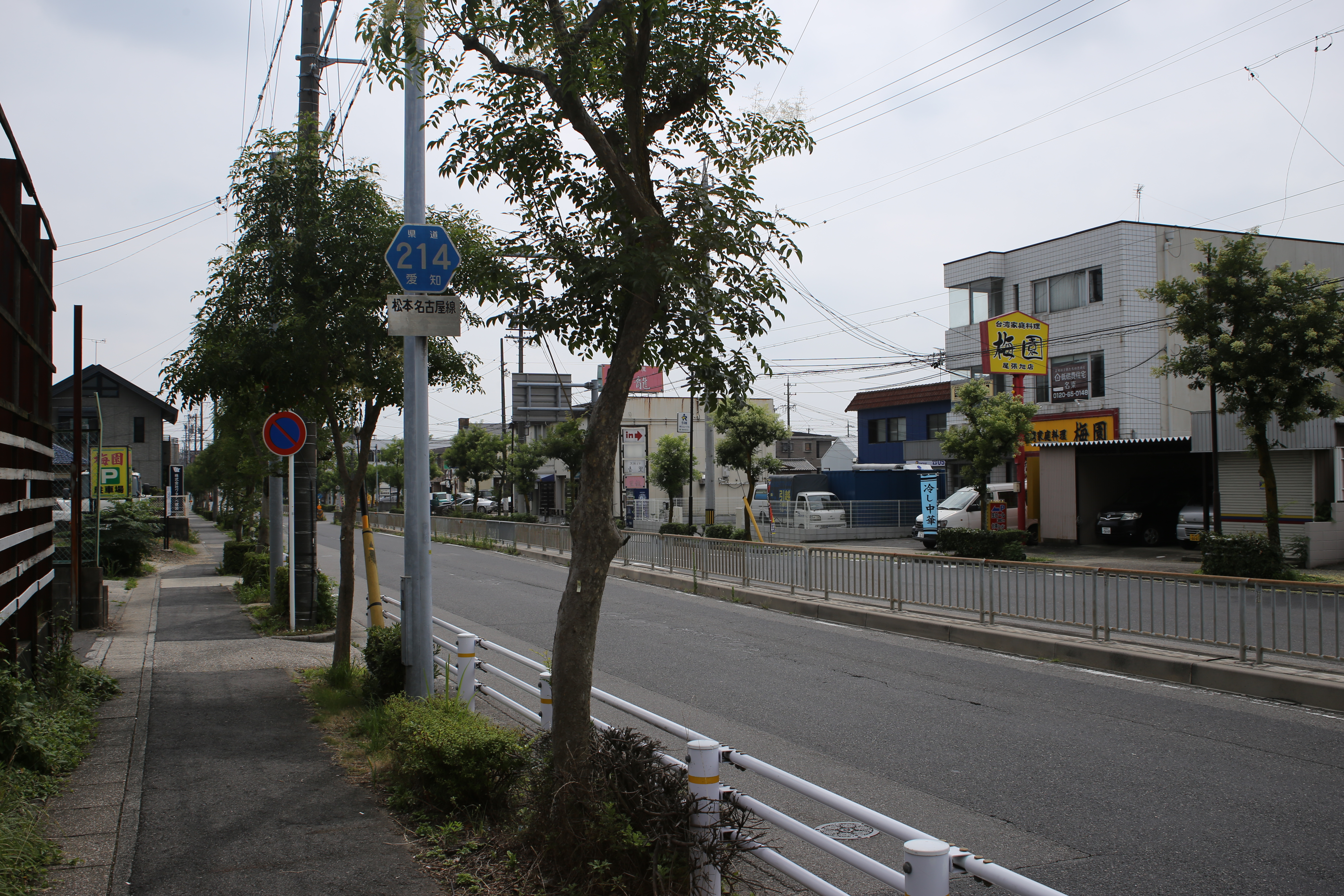 愛知県尾張旭市の愛知県道214号松本名古屋線